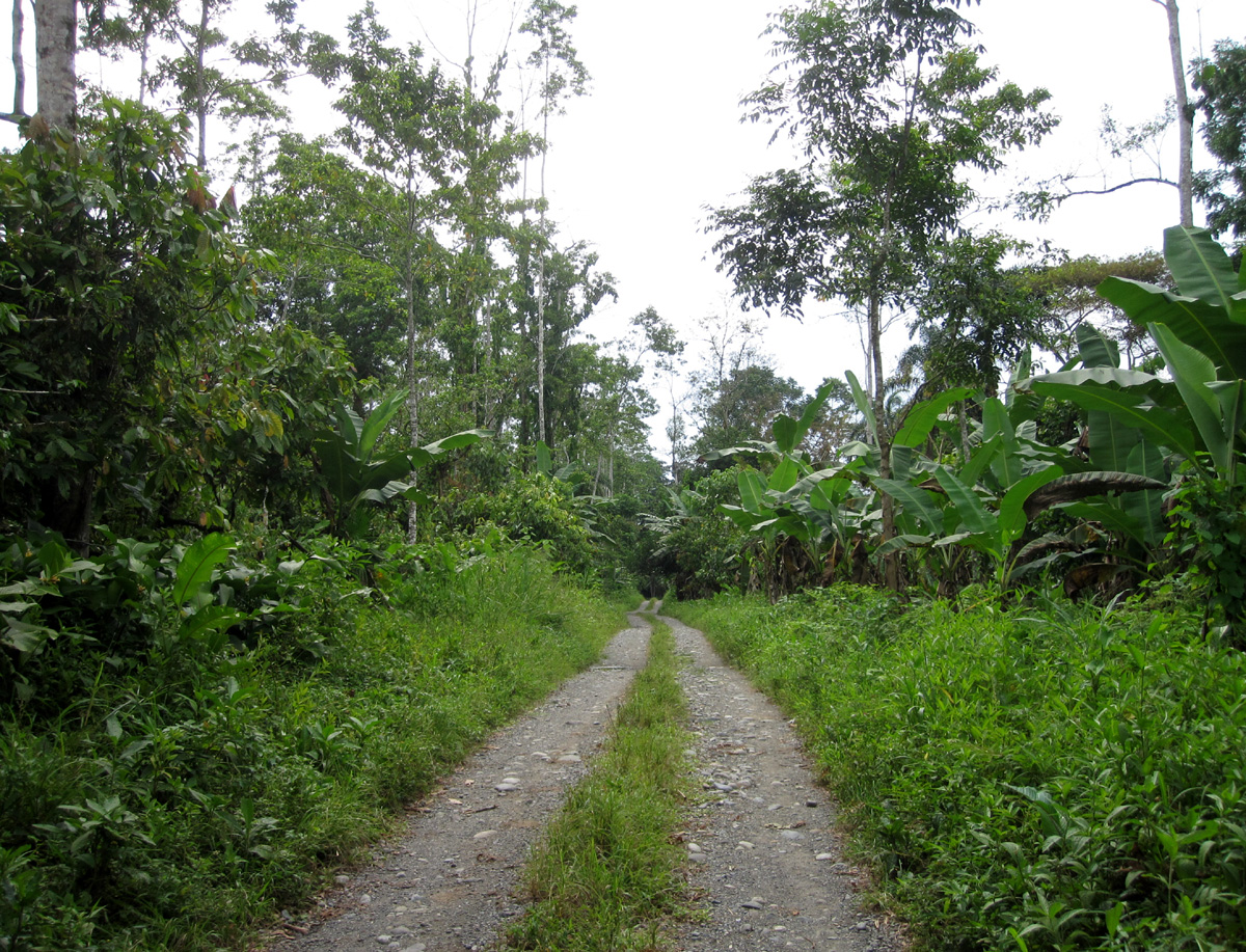 Sti i Amubre i bribri-reservatet i Talamanca i Costa Rica